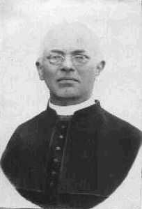 František Snopek (1853 - 1921), Český římskokatolický kněz, církevní historik a archivář.